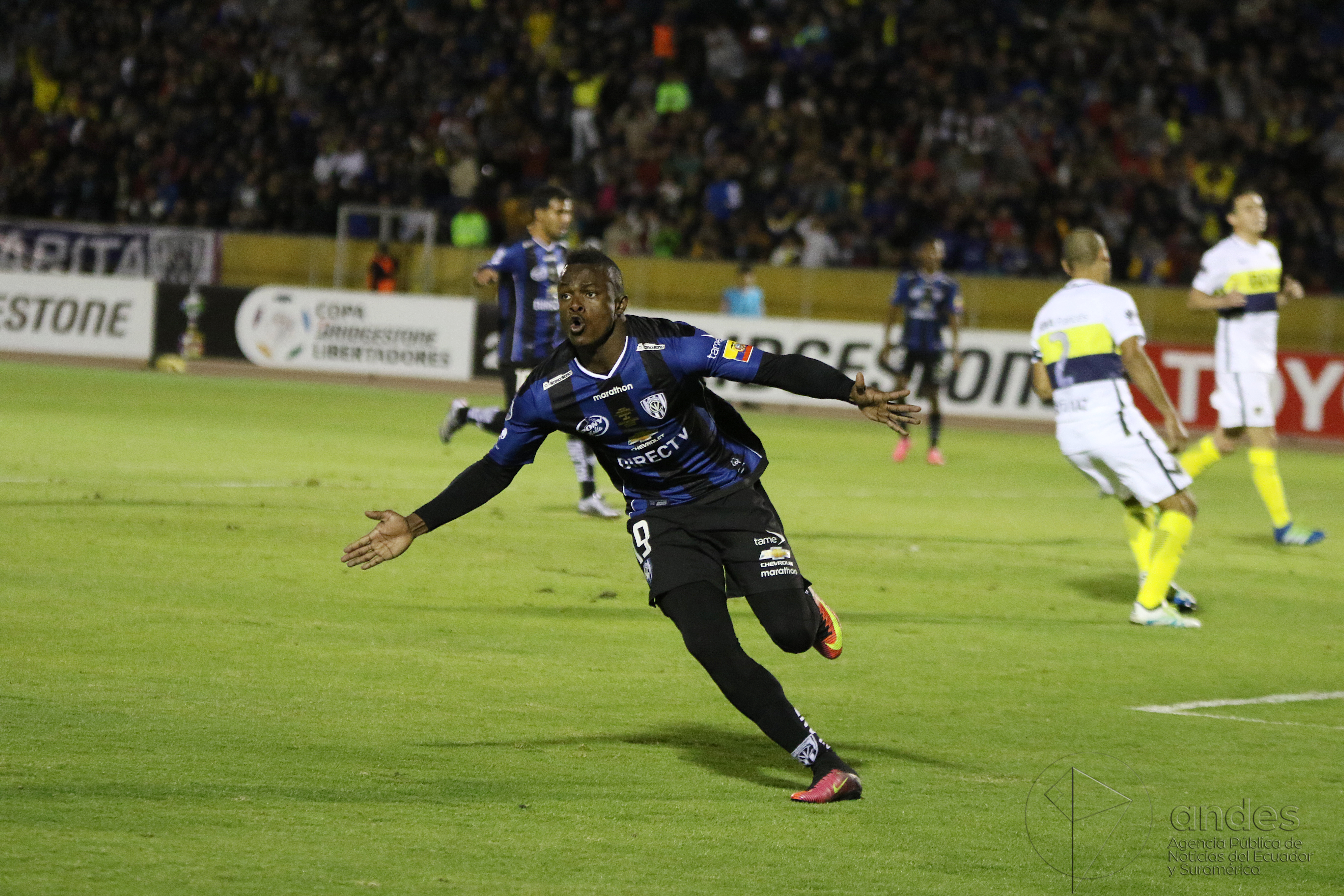 Quito, 07 jul (Andes).- Independiente del Valle vence a Boca Juniors de Argentina, por 2 tantos a 1 y mantiene abierta la serie de semifinales en Copa Libertadores. ANDES/Micaela Ayala V.